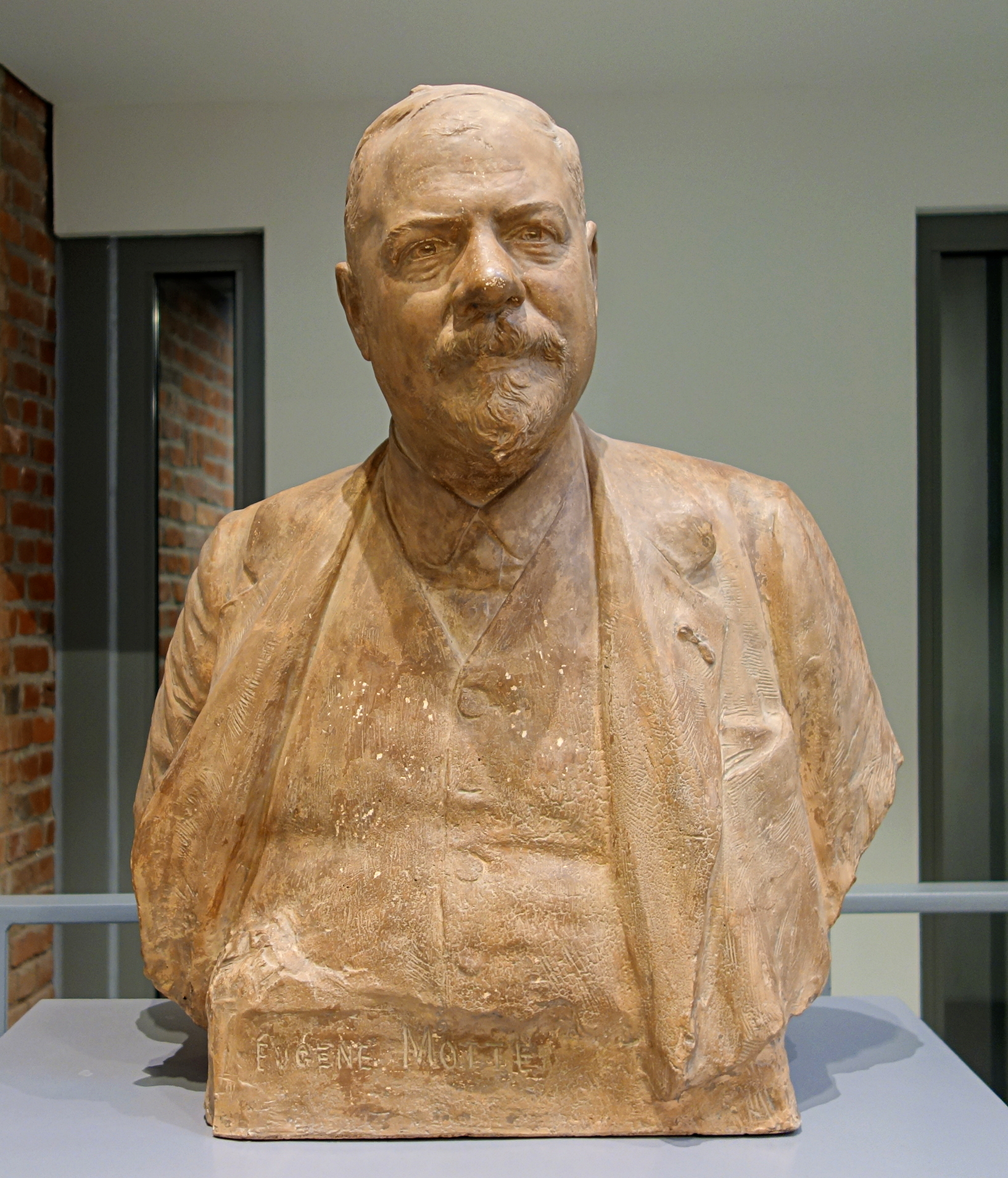 Buste en platre patiné de Eugène Motte, industriel et maire de Roubaix de 1902 à 1912, par Corneille Theunissen (1863-1918). Exposé au Musée d'Art et d'Industrie à Roubaix.